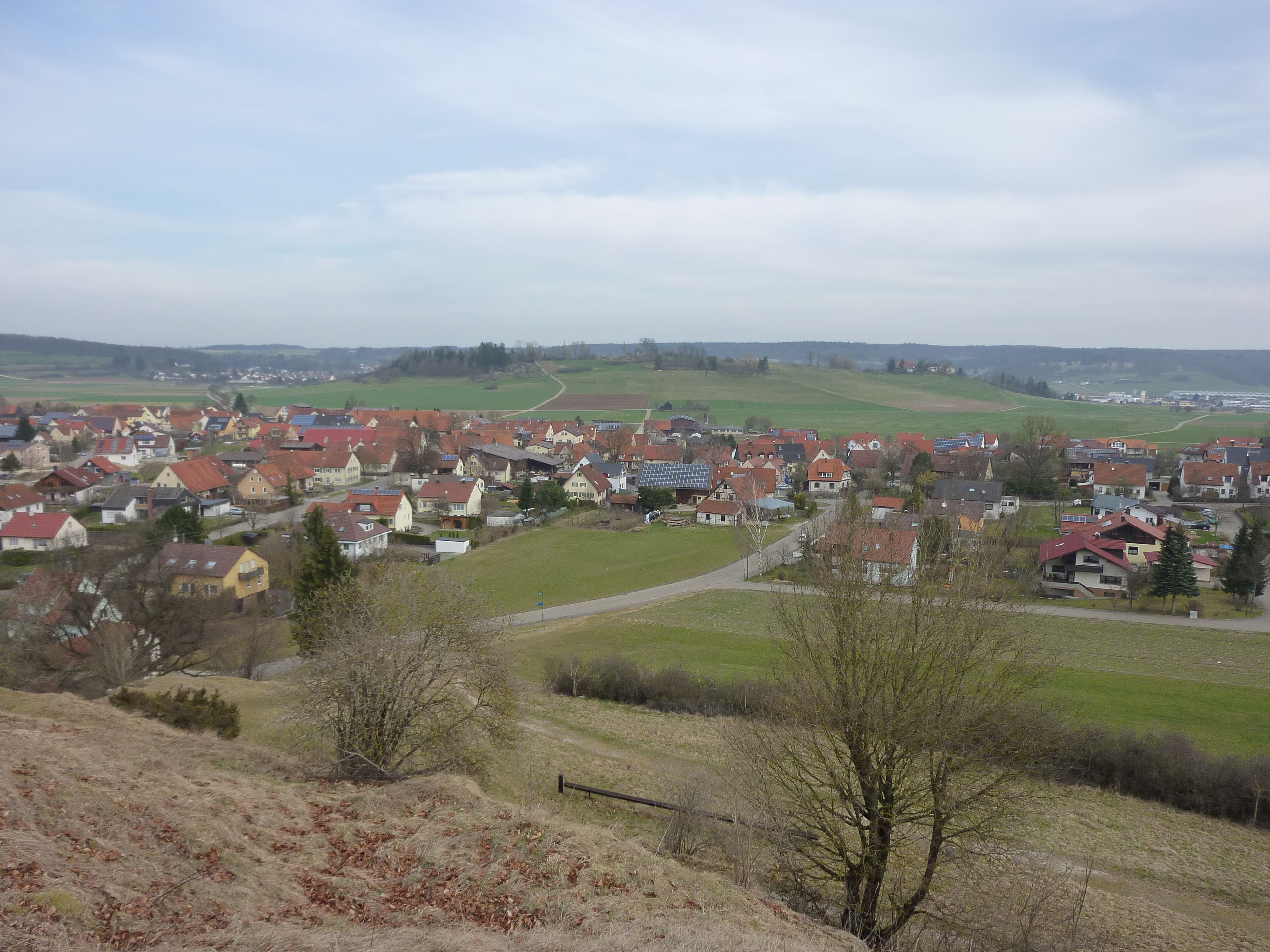 Steinhirt